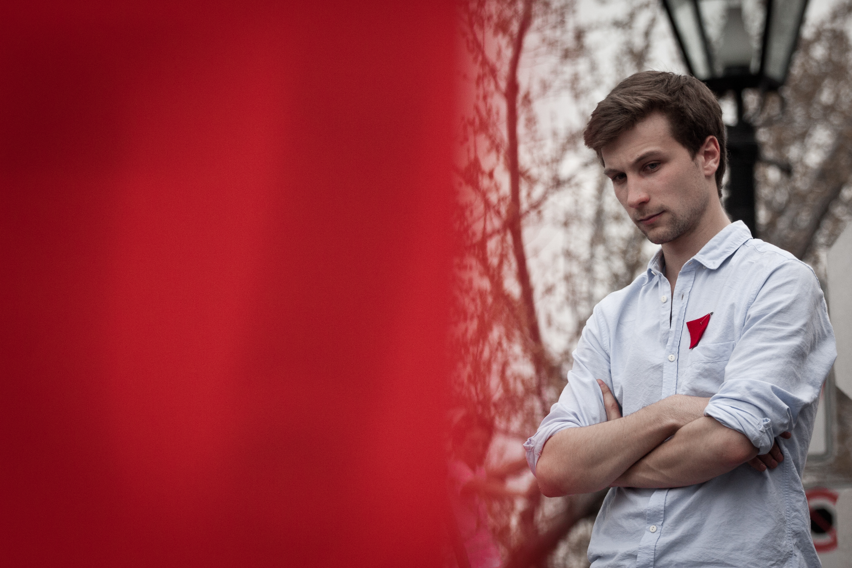 Gabriel Nadeau-Dubois, lors de la manifestation étudiante à la Place du Canada, Montréal, jeudi 22 mars.